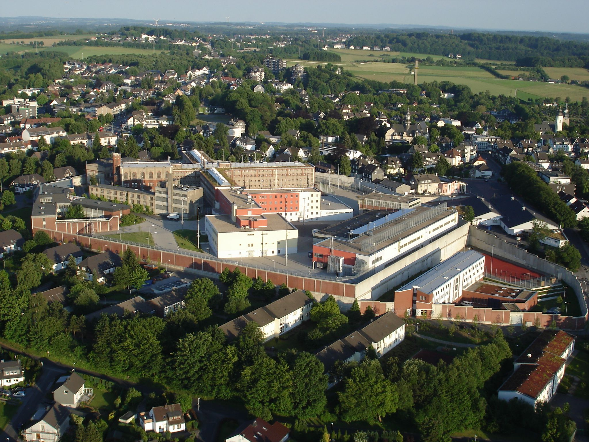 Luftaufnahme der Justizvollzugsanstalt Remscheid